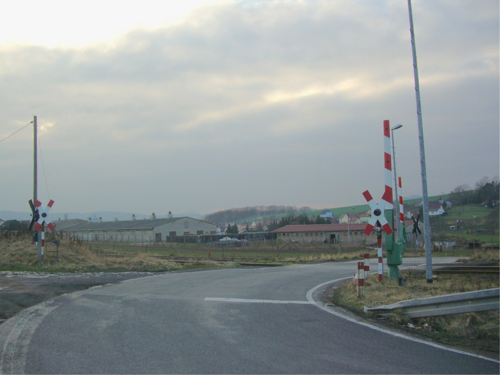 Bahnübergang mit Blinklichtanlage und Halbschranken (Version der DDR) (Standort: Unterrohn)